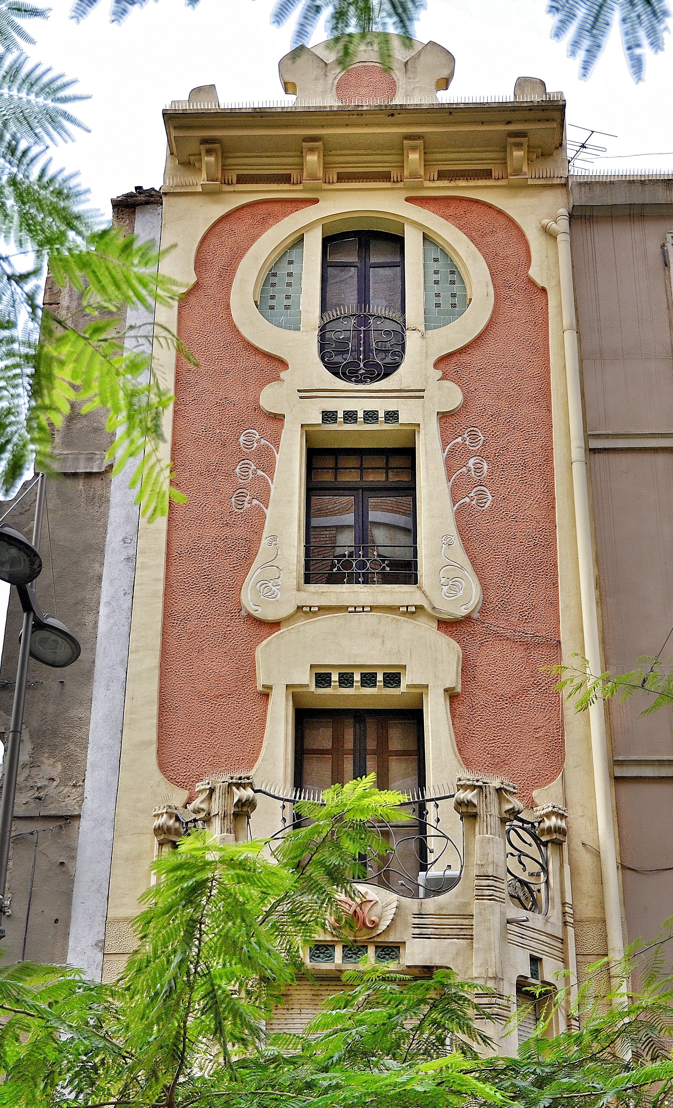 Casa del poeta y político lleidata Magí Morera i Galicia (Avenida Blondel de Lleida)